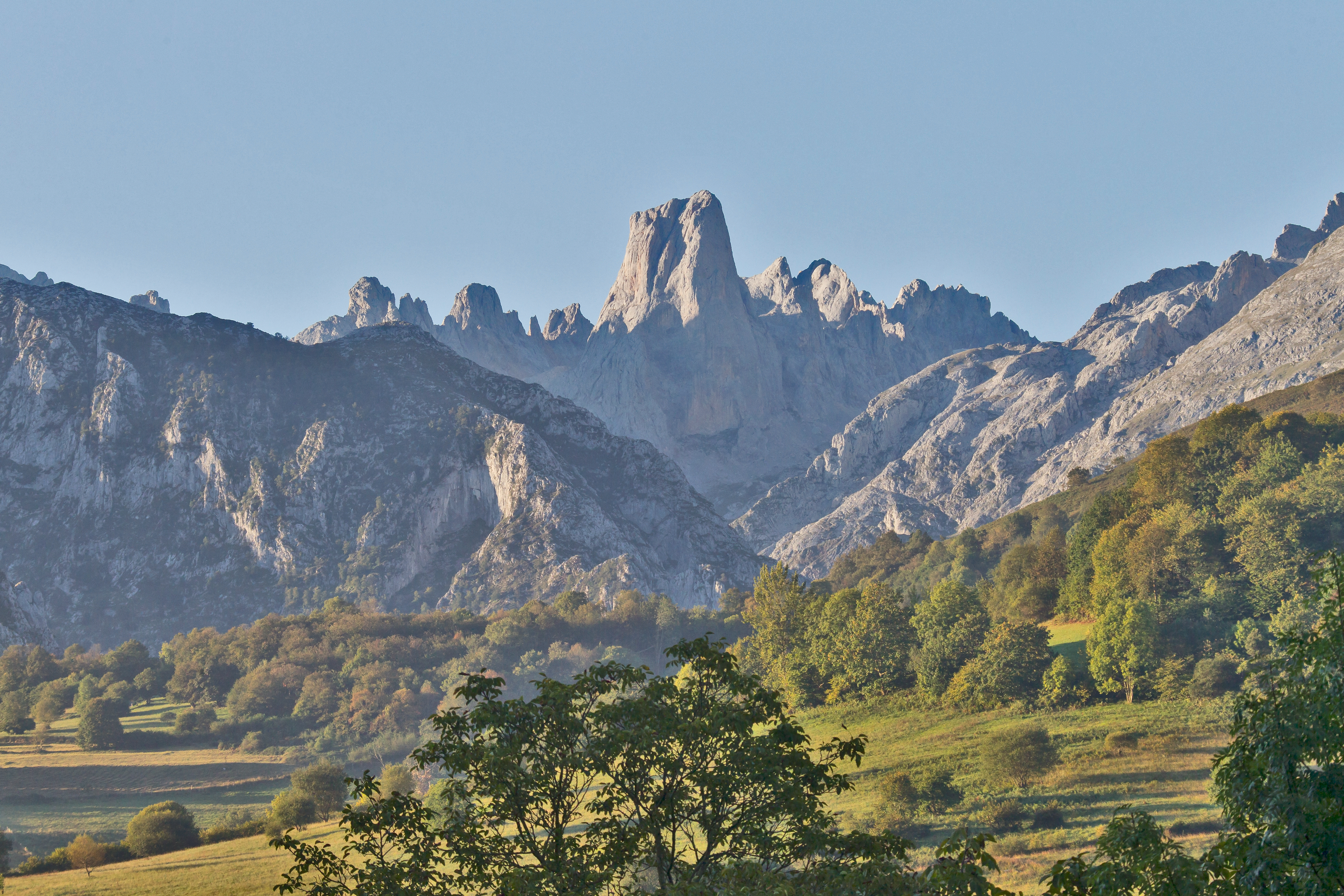 El Naranjo de Bulnes o Pico Urriellu desde el Pozo de La Oración en Cabrales (Asturias, España).